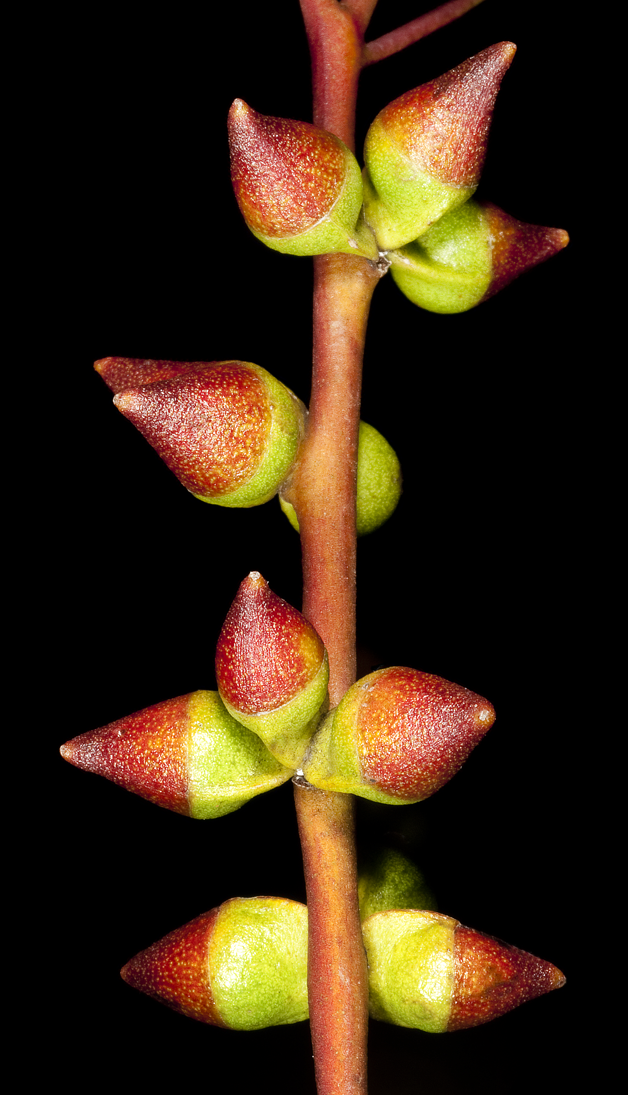 KRT4496 Western Australian Herbarium